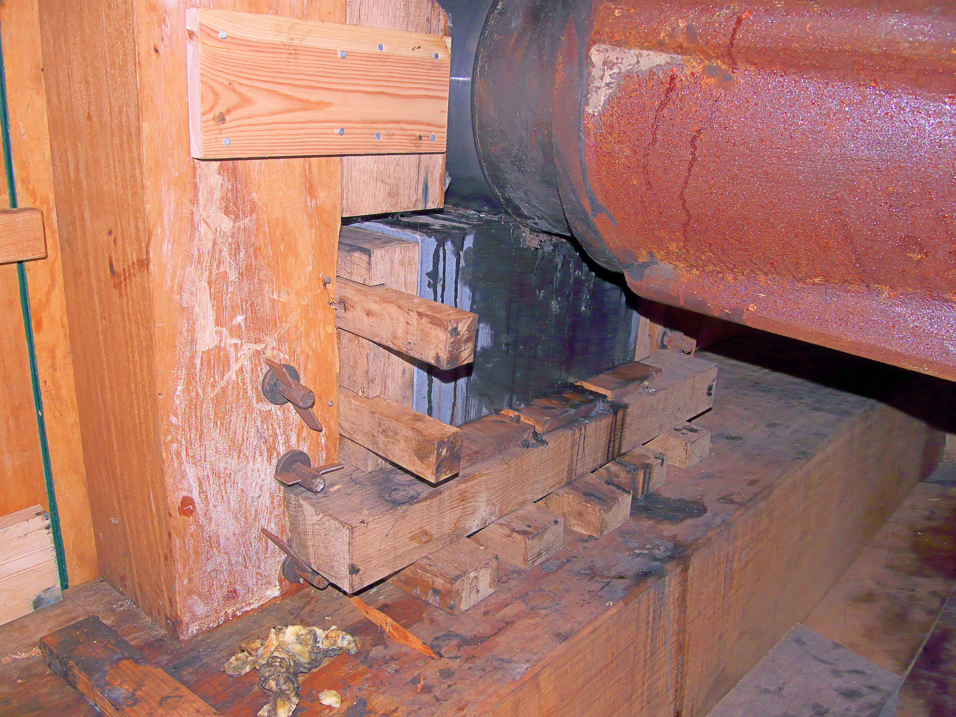 Molen De Koe Ermelo, halslager met steenbed